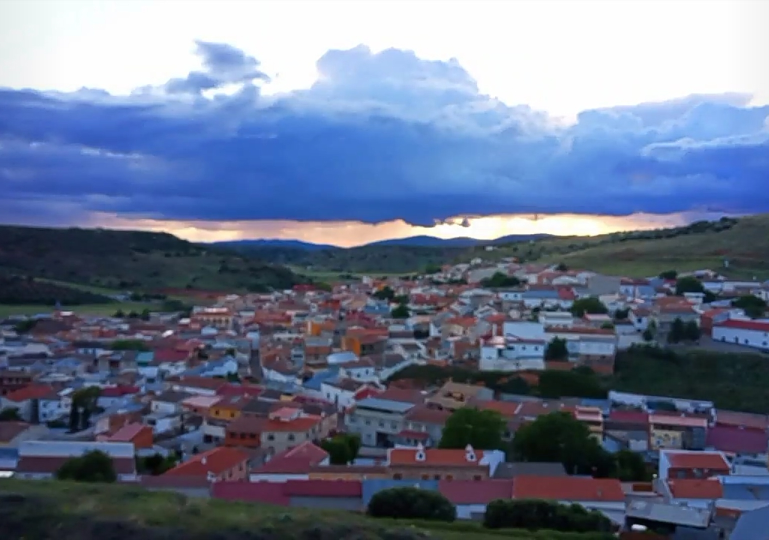 Vista general